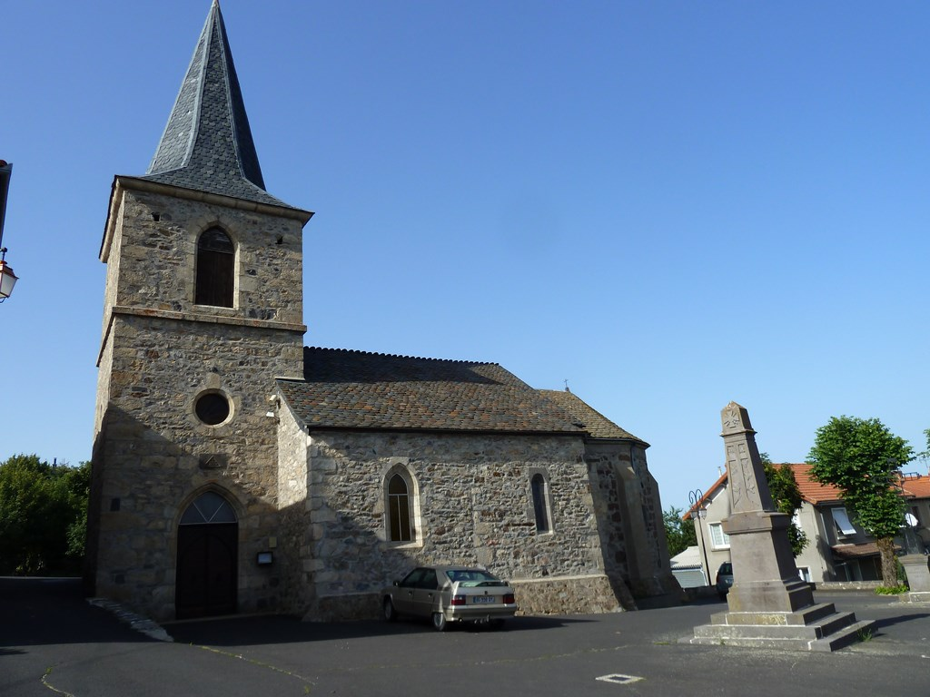 Église de Védrine St Loup, Cantal France